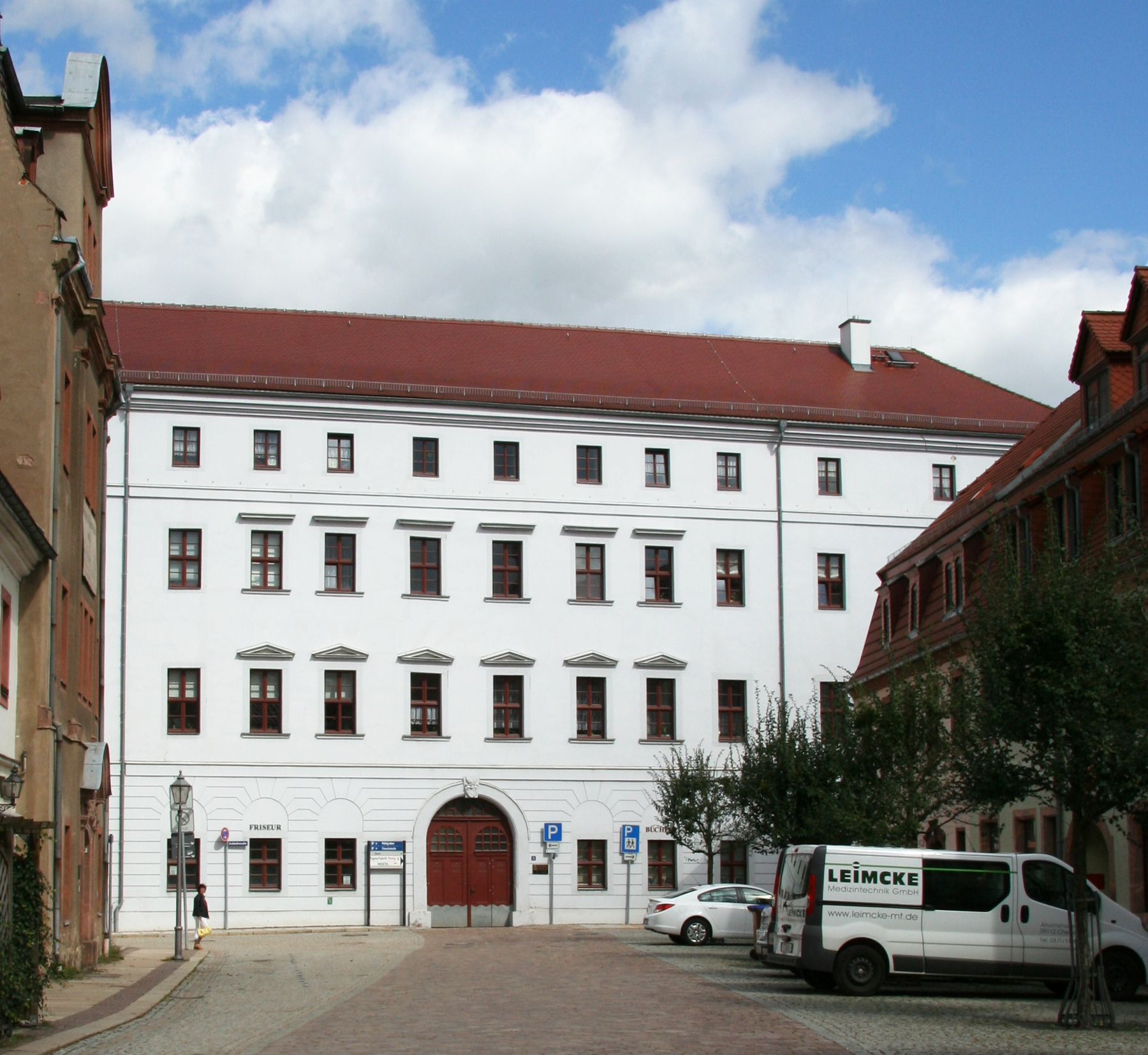 Neues Schloss in Penig Marktansicht